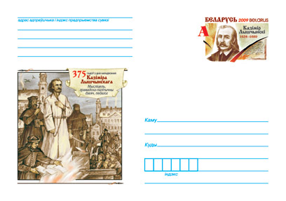 Художественный конверт с оригинальной маркой «375 лет со дня рождения Казимира Лыщинского», подготовленный ИЦ «Марка» РУП «Белпочта». Иллюстрация - 375 лет со дня рождения Казимира Лыщинского. Мыслитель, общественно-политический деятель, педагог — на бел. языке, сцена казни К. Лыщинского. Художник - Микола Рыжий.